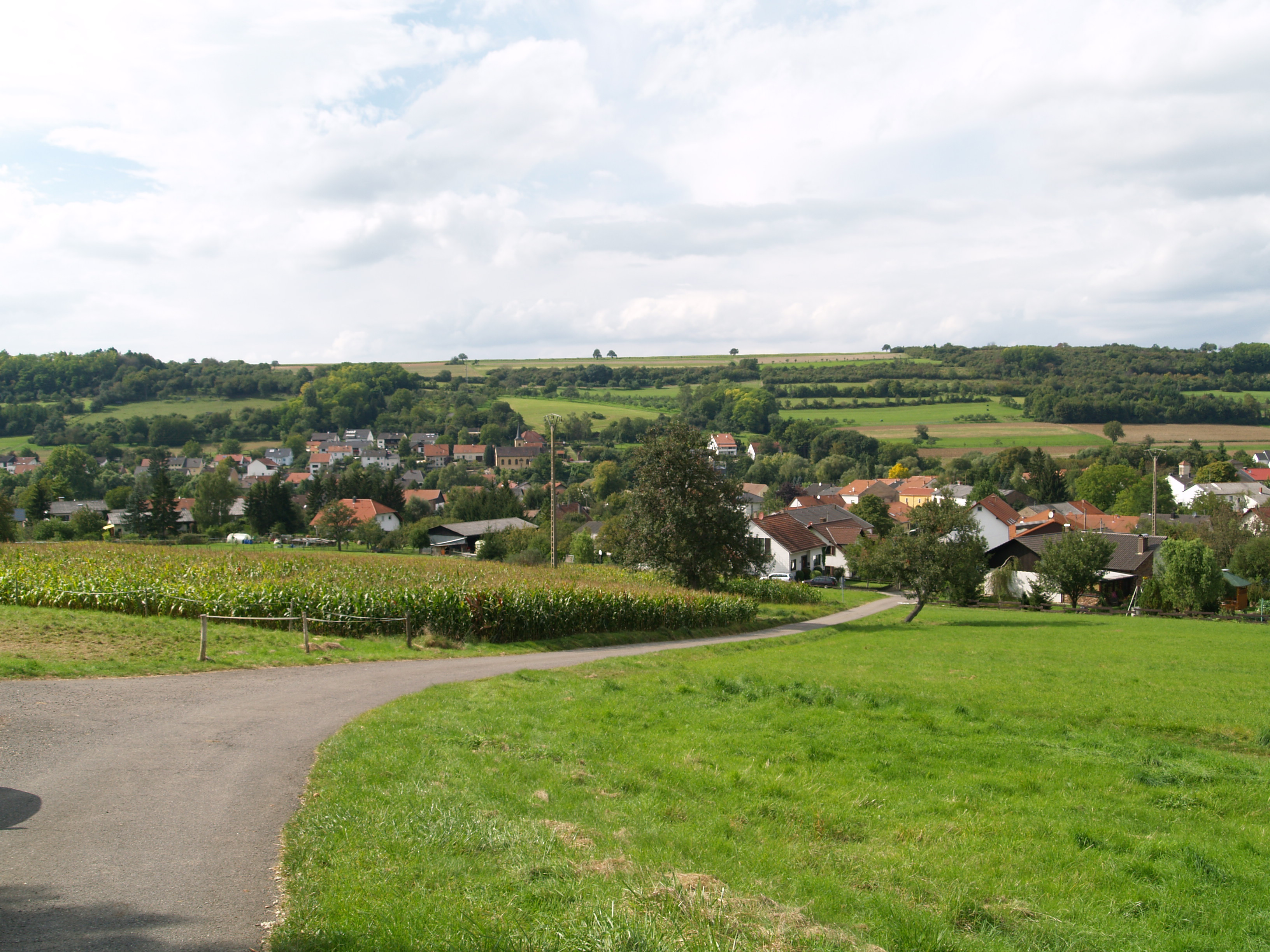 Ihn Ortsteil der Gemeinde Wallerfangen - Saargau